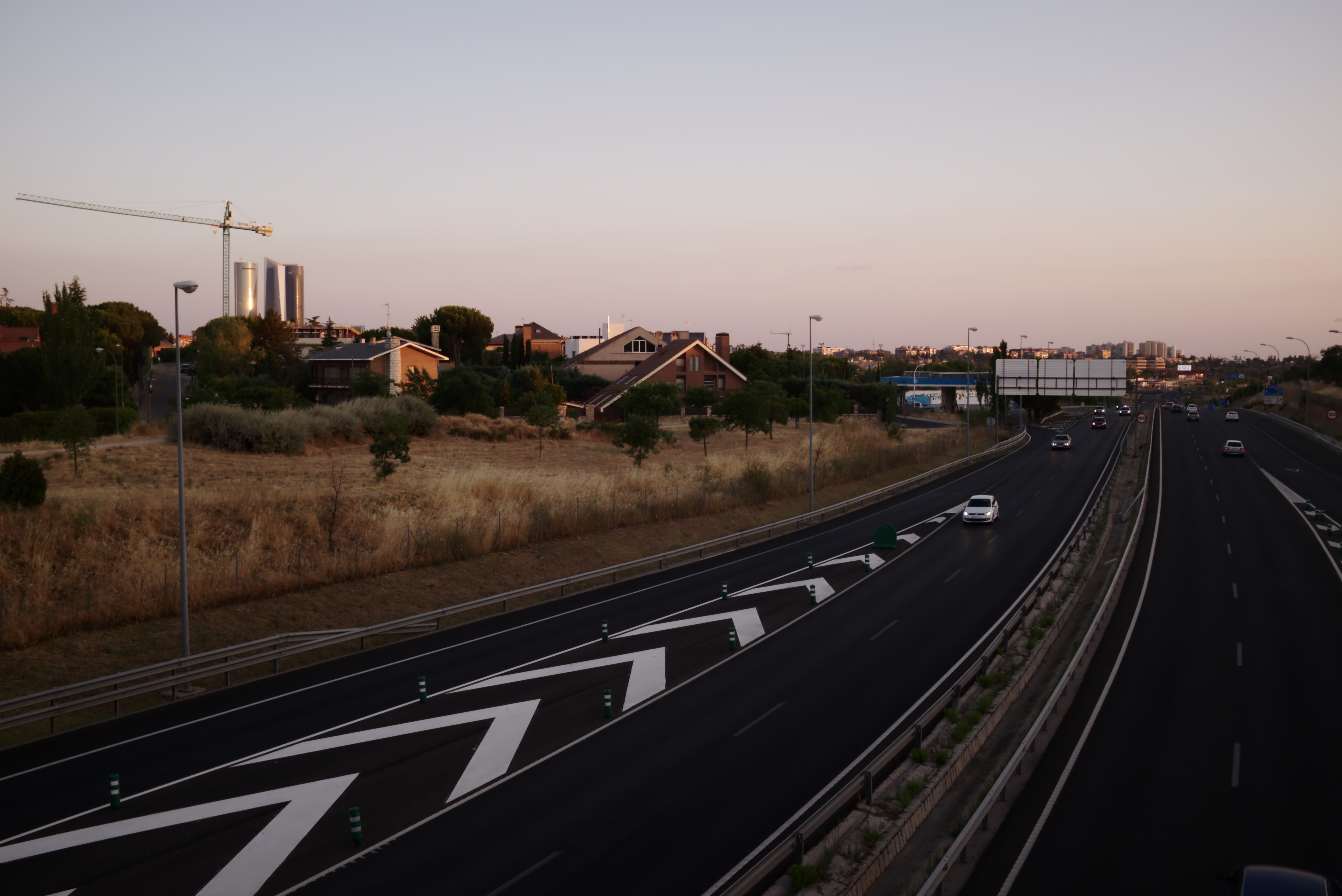 Madrid